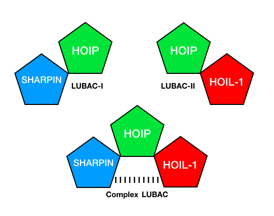 Les tres diferents conformacions que pot adoptar el complex LUBAC. Els dos dímers (LUBAC-I i LUBAC-II) són menys estables que el trímer (complex LUBAC) que estableix interaccions entre les subunitats SHARPIN i HOIL-1.